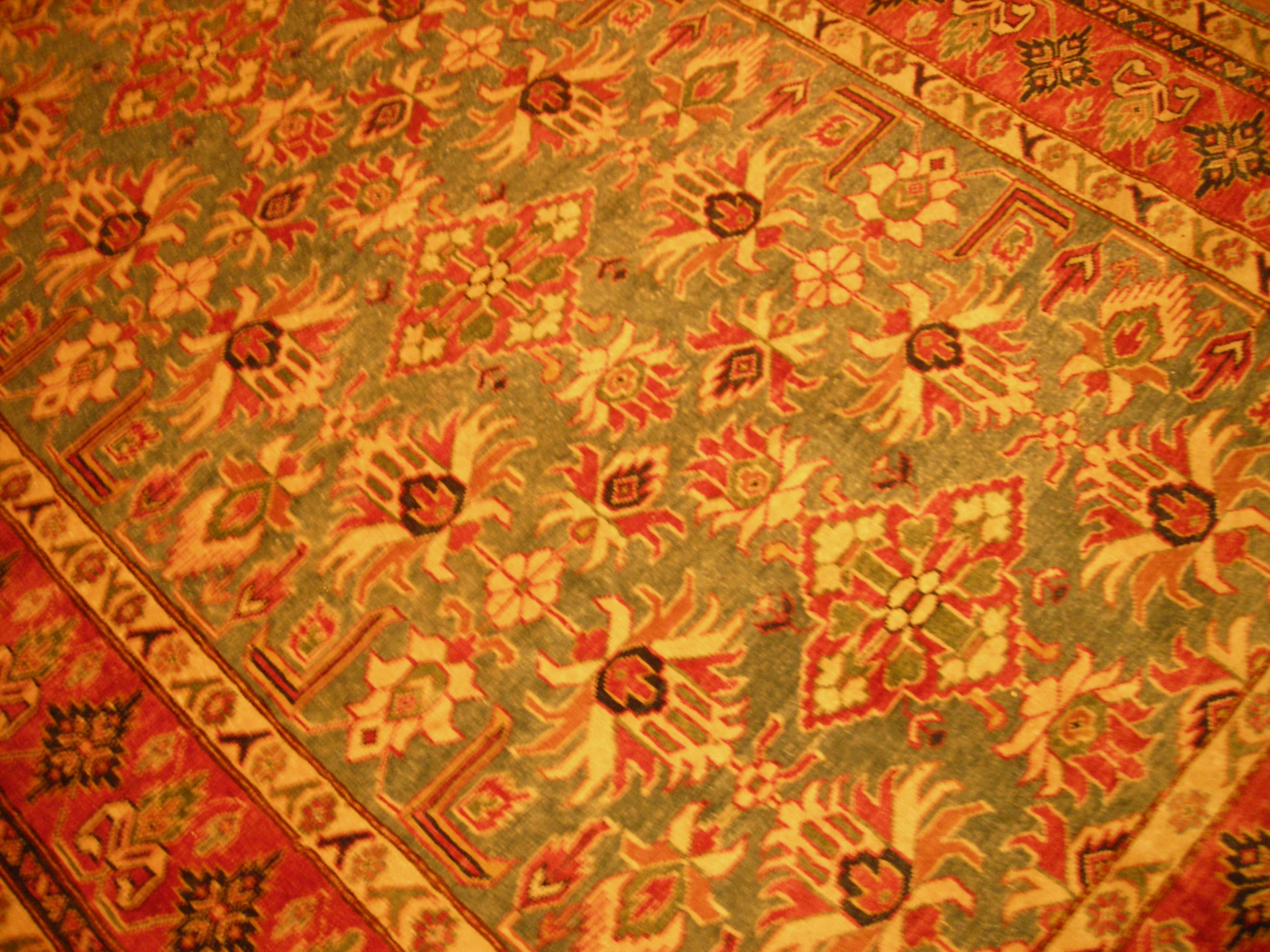 Photo personelle représentant un Tapis persan